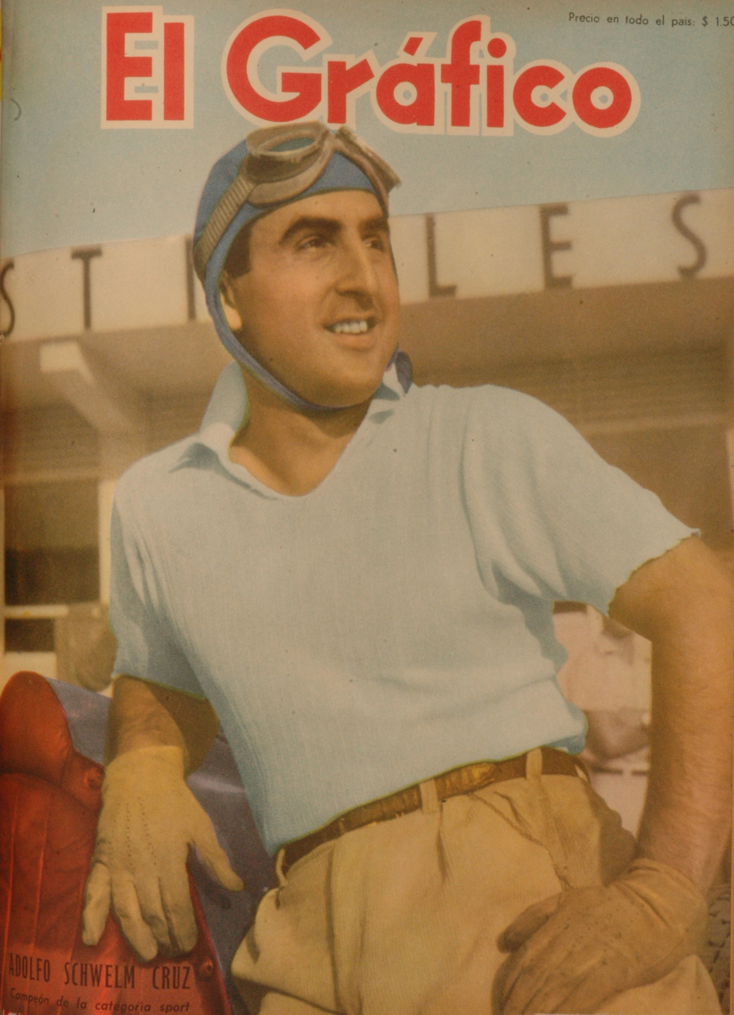 El Grafico del 04 de Abril de 1952. Edicion 1704